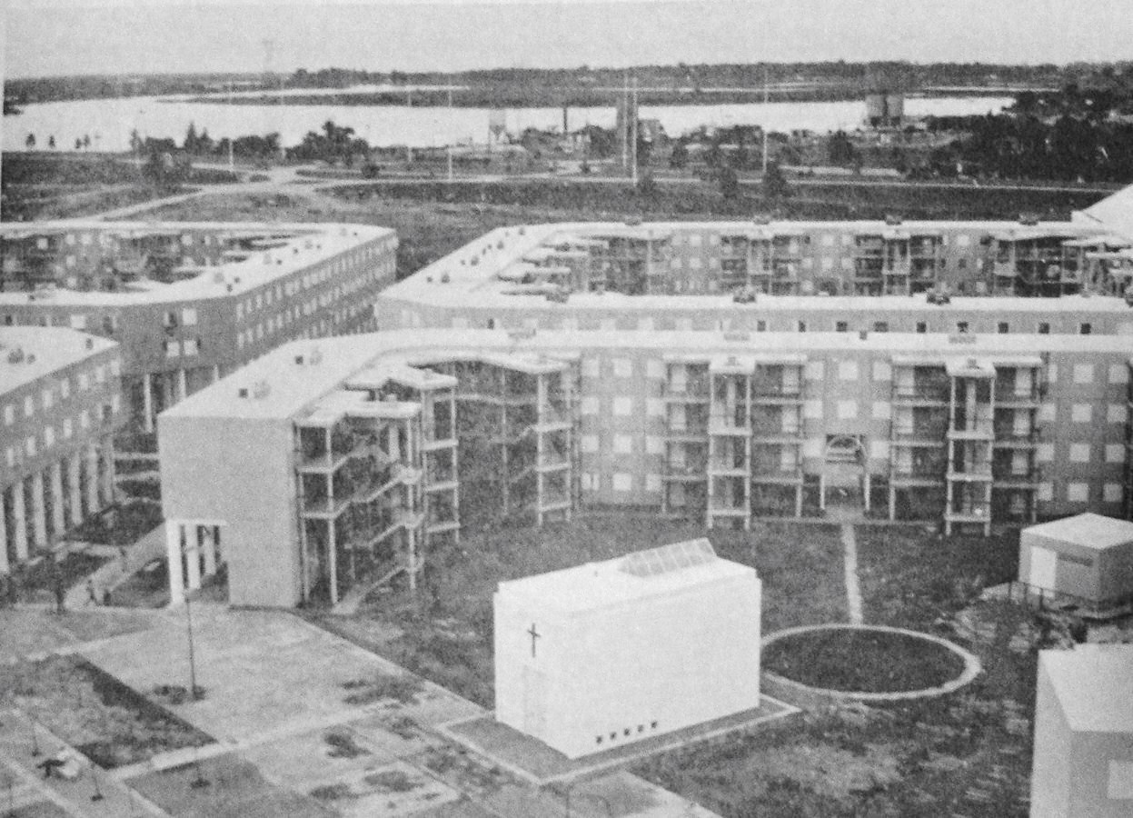 Vista aérea del Barrio Centenario con su capilla, en la ciudad de Santa Fe. Arquitectos Baudizzone-Díaz-Erbin-Lestard-Varas.